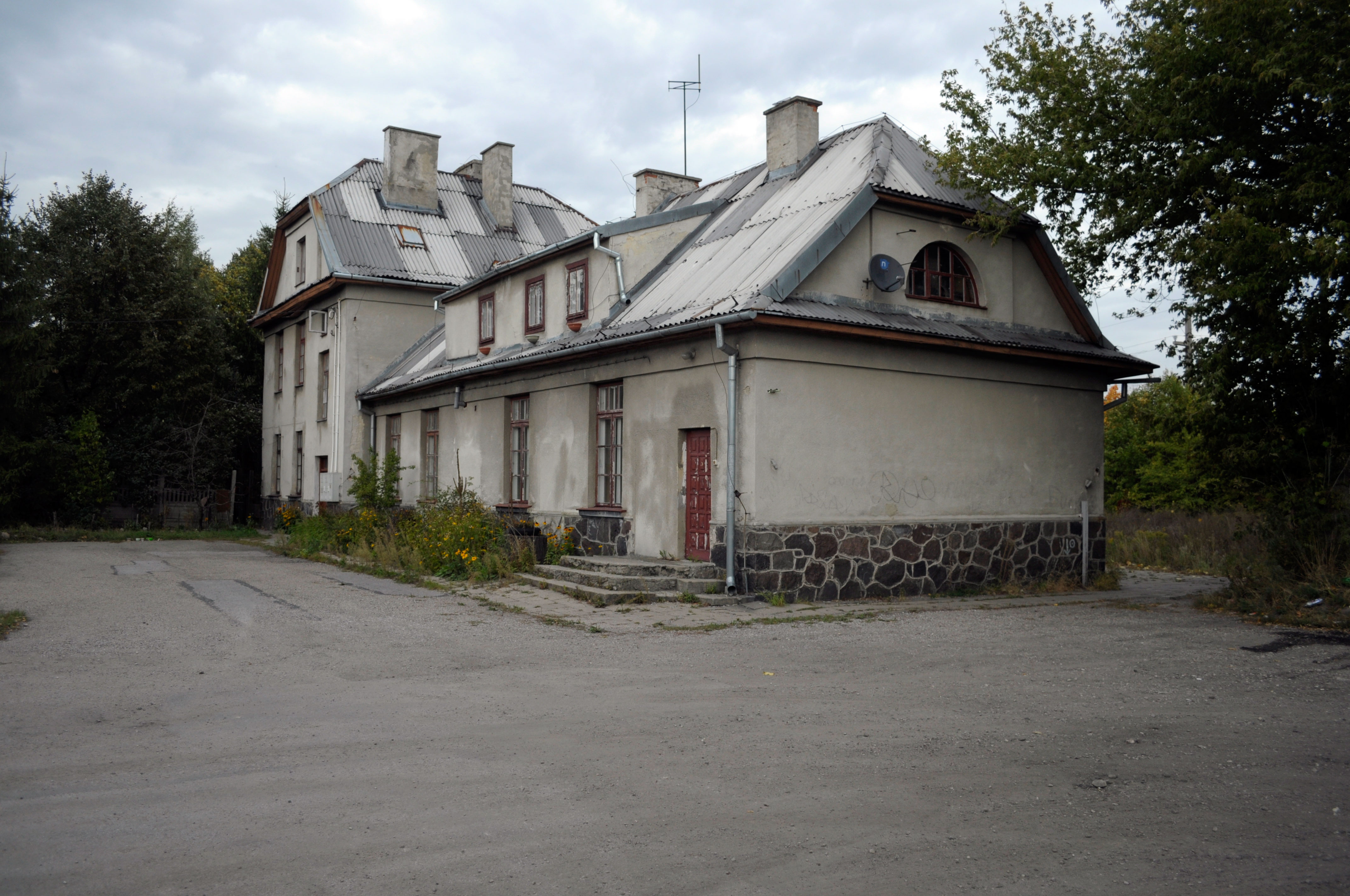 Grójecka Kolej Dojazdowa - dworzec Grójec